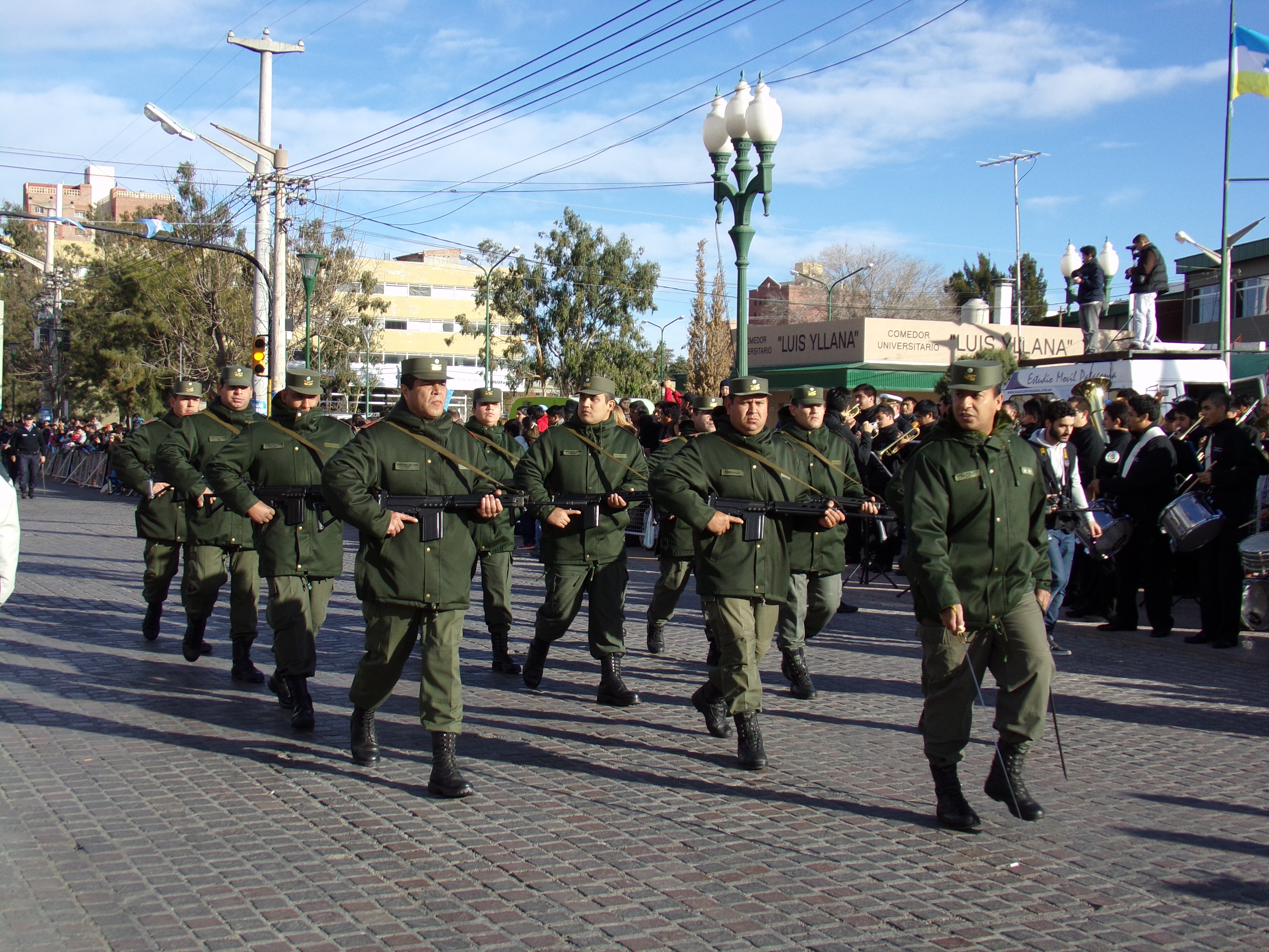 Acto del 25 de mayo de 2015 en Trelew, Chubut, Argentina